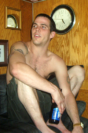 Steve-O during 2003 interview